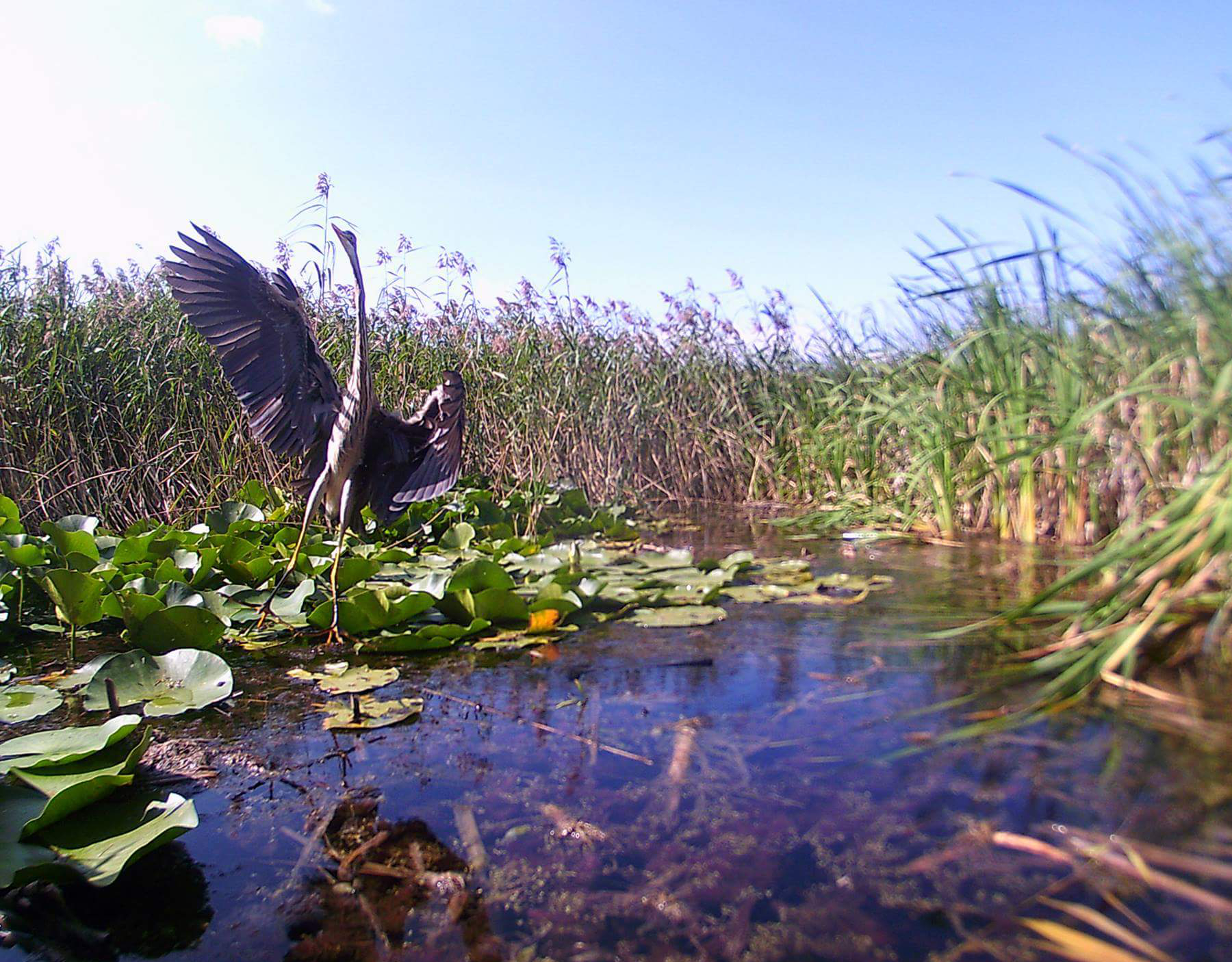 Ръждива чапла - снимка от фотокапан в Драгоманското блато